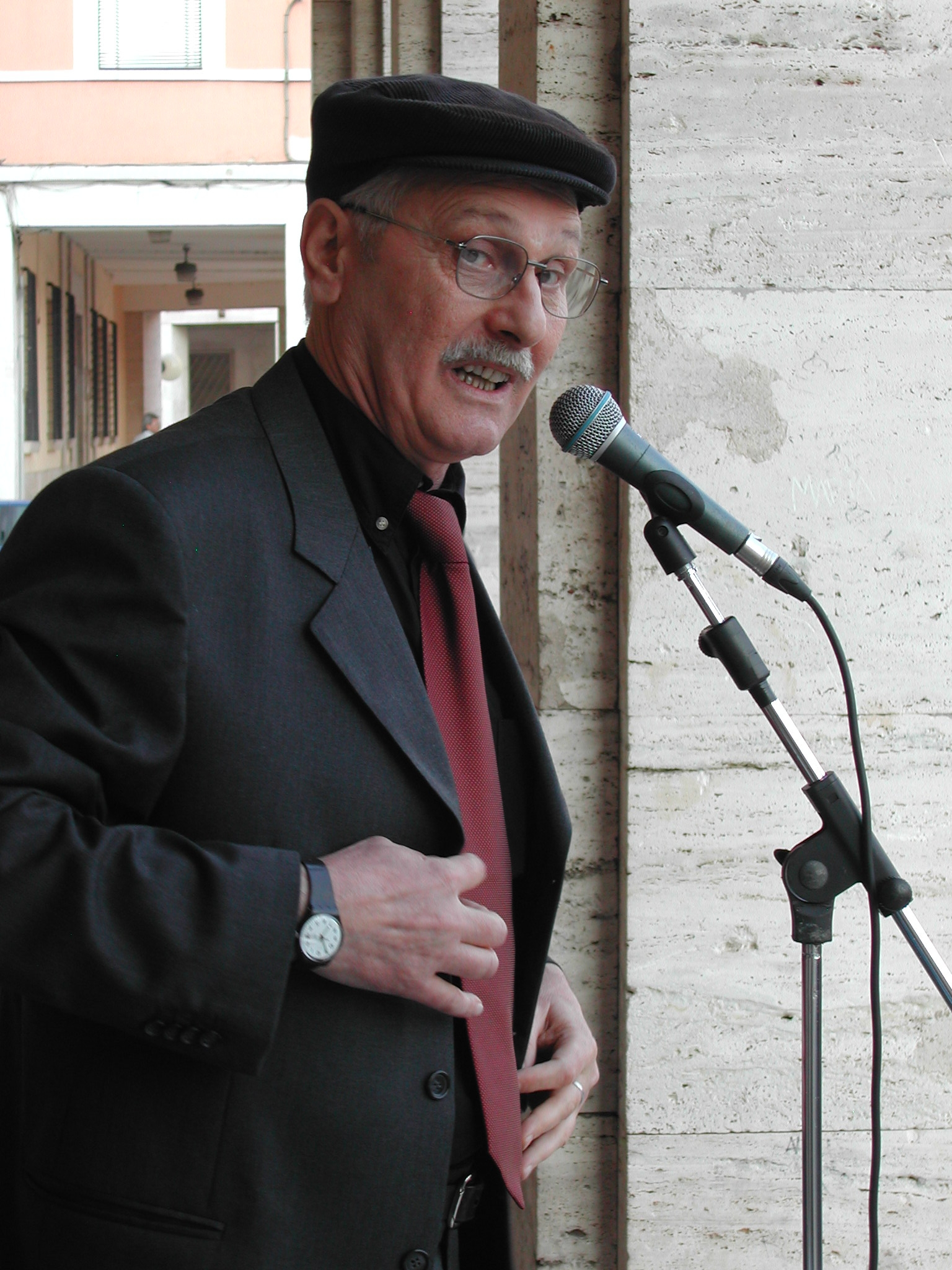 Antonio Pennacchi foto di Aldo Ardetti